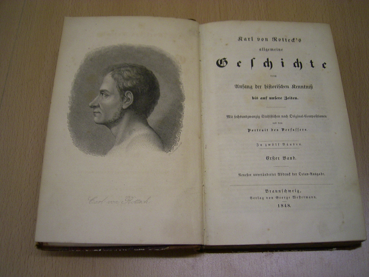 Karl von Rotteck's allgemeine Geschichte, Ausgabe von 1848, Titelseite, Band 1 und 2.